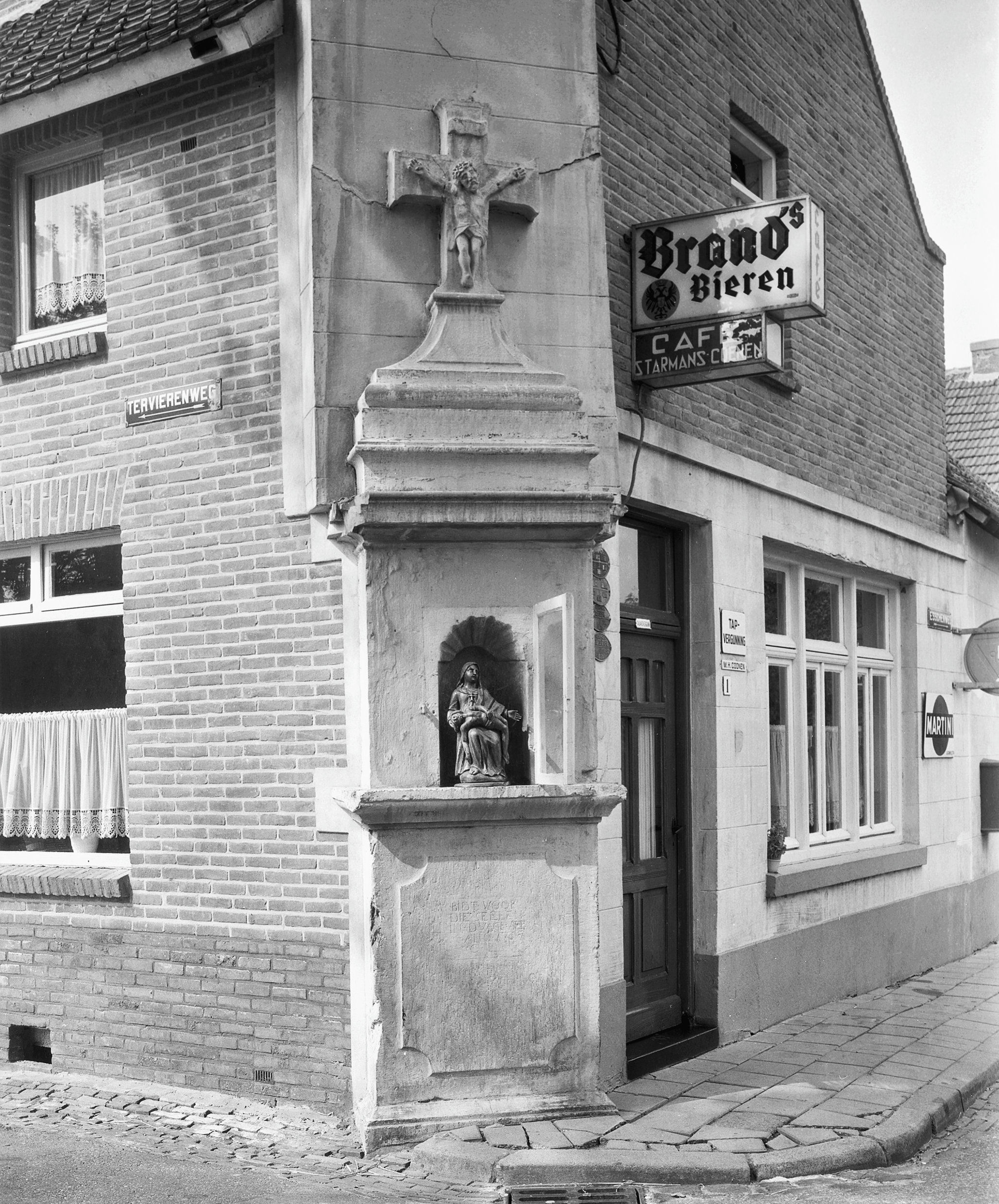 Wegkapelletje This is a possible Rijksmonument: Find the monument in the Monuments database: in Voerendaal All Rijksmonumenten in Voerendaal Is this a Rijksmonument? Yes No More information about this project and help. More images to work at in Category:Possible Rijksmonumenten.